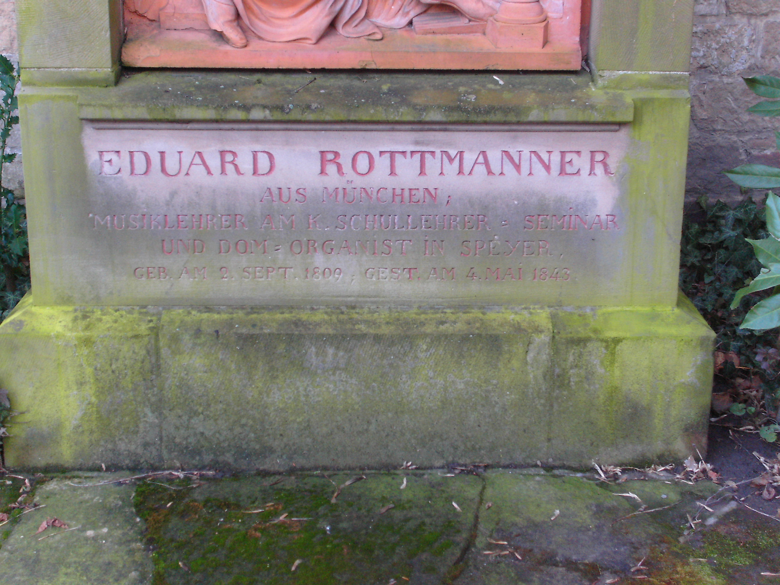 Eduard Rottmanner, deutscher Komponist, Grabinschrift Alter Friedhof Speyer.